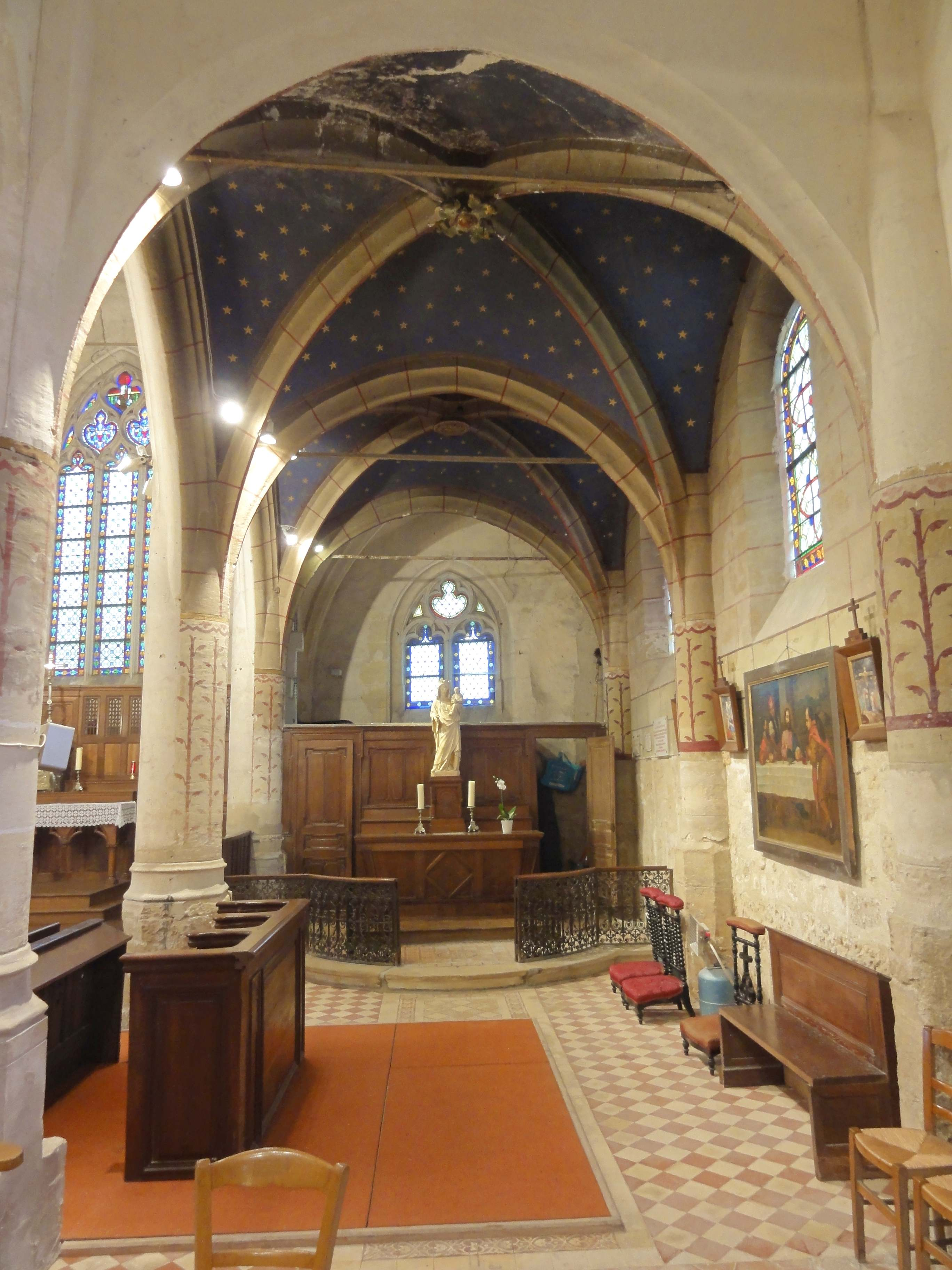 Intérieur de l'église de l'Assomption de Notre-Dame - voir titre.